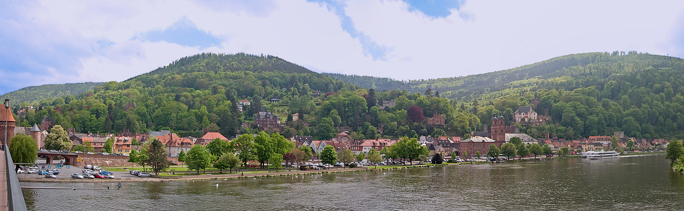 Panorama der Miltenberger Altstadt von der Brücke über den Main aus gesehen.